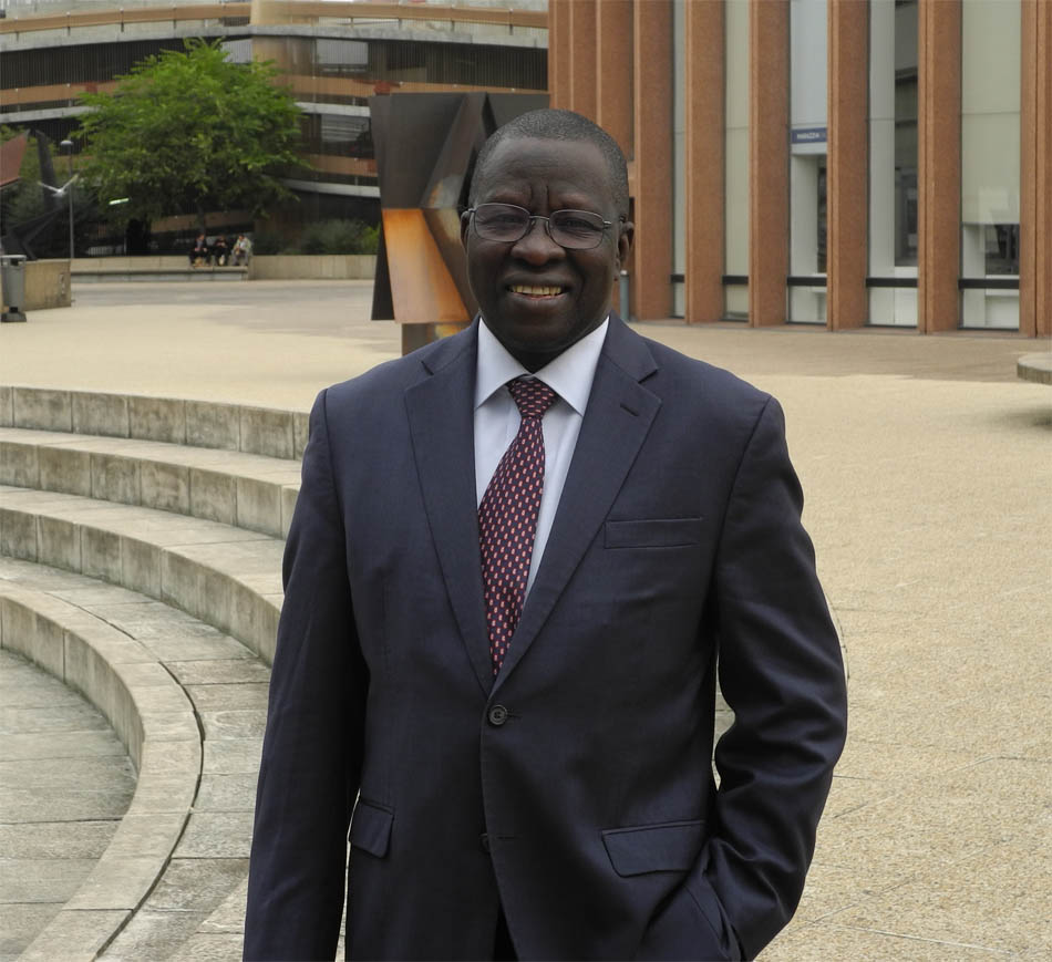 Sékou Koureissy CONDE